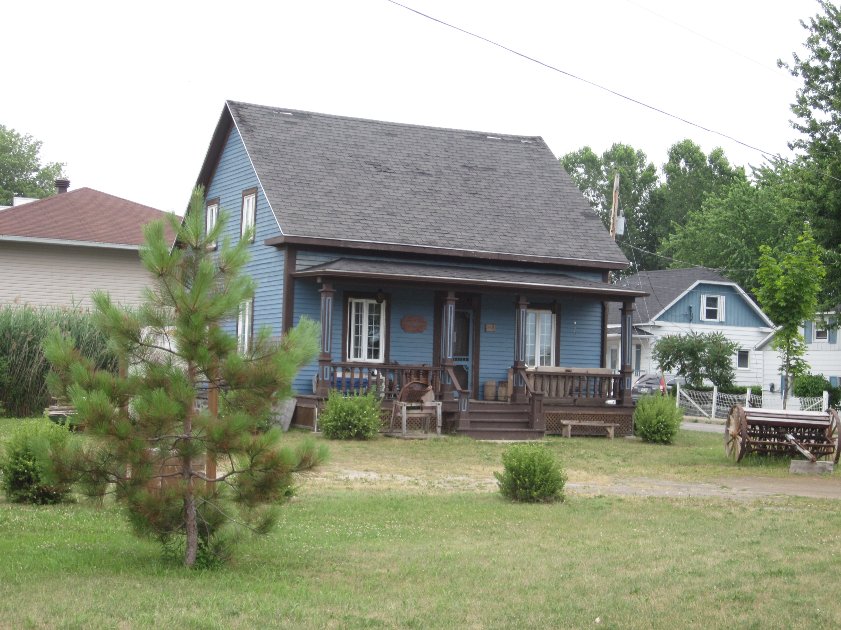 La maison Dufresne est une maison villageoise construite vers 1850 à Pointe-du-Lac. Elle a été citée monument historique en 2001.